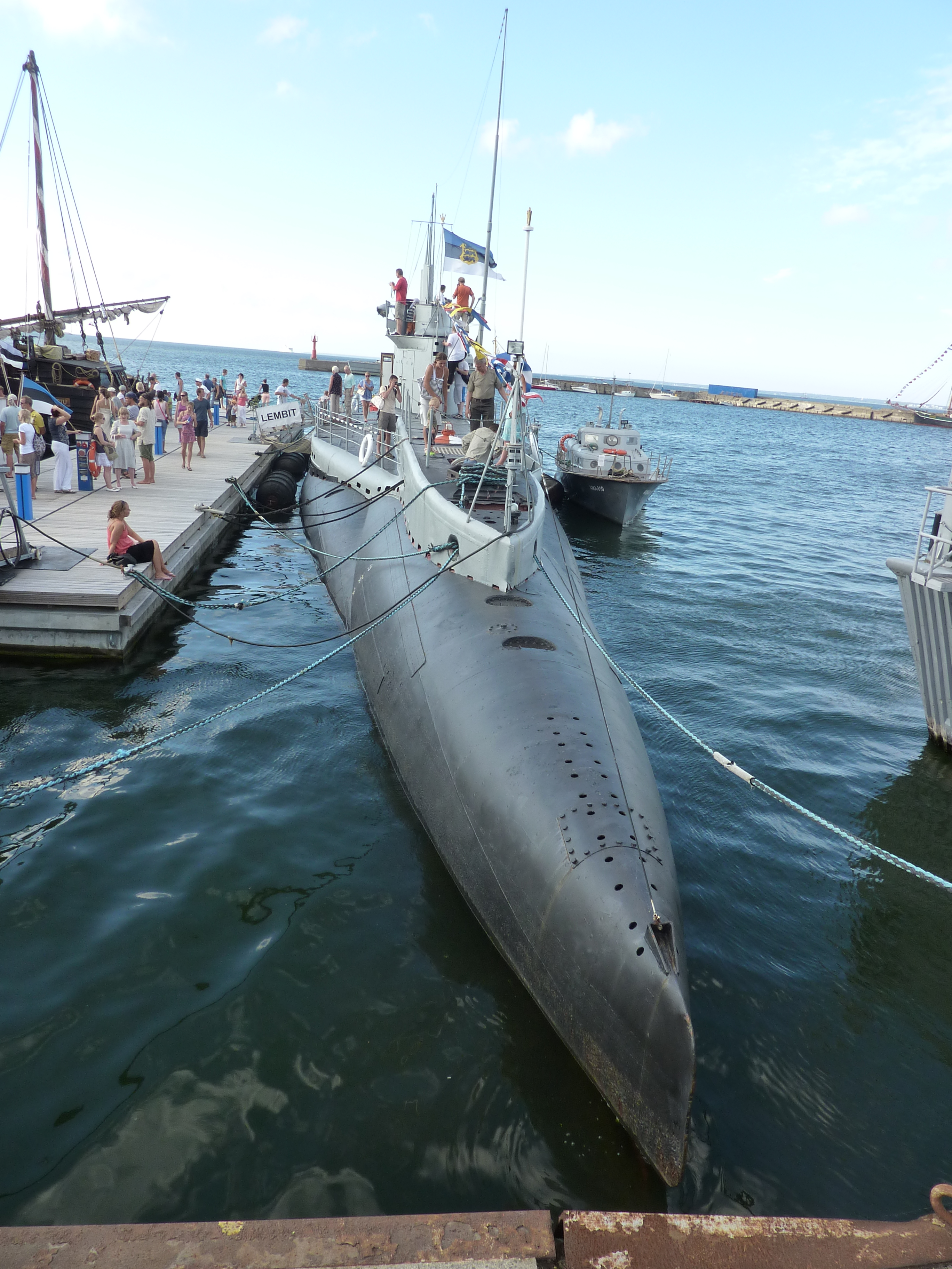 okręt podwodny Lembit